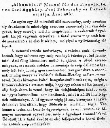 Aggházy Károly Canon (Albumblatt) kompozíciójának méltatása